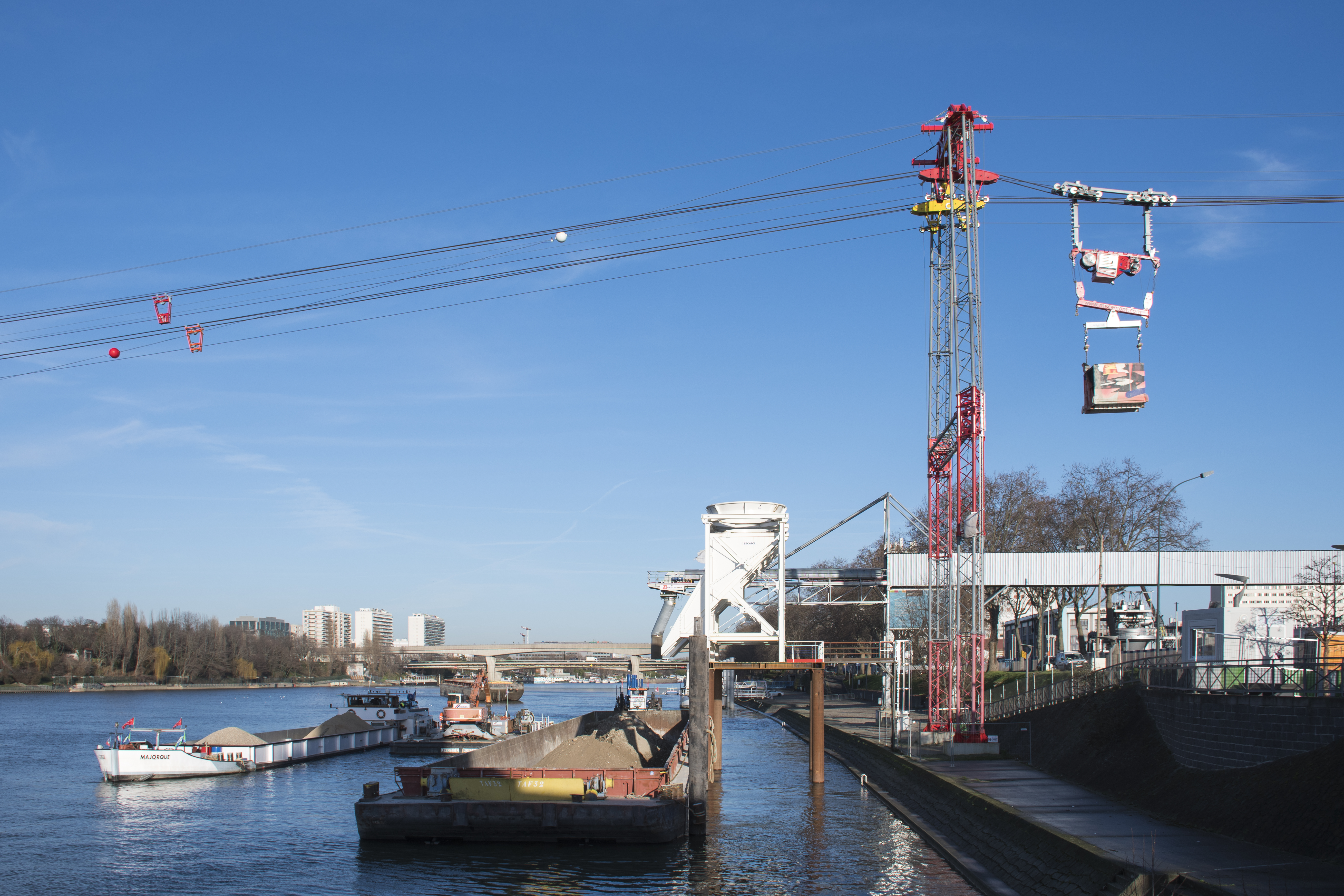 Arrivée d'une benne transportant des gravats prêts à être déversés dans une péniche pour évacuation.